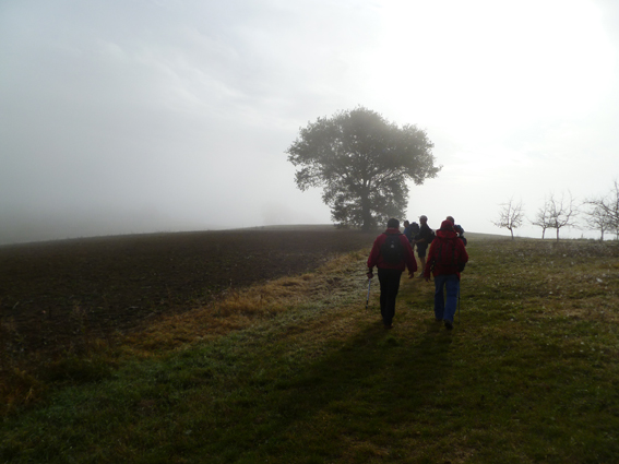 La variante serpente agréablement, par monts et par vaux, de Condom à Valence-sur-Baïse.